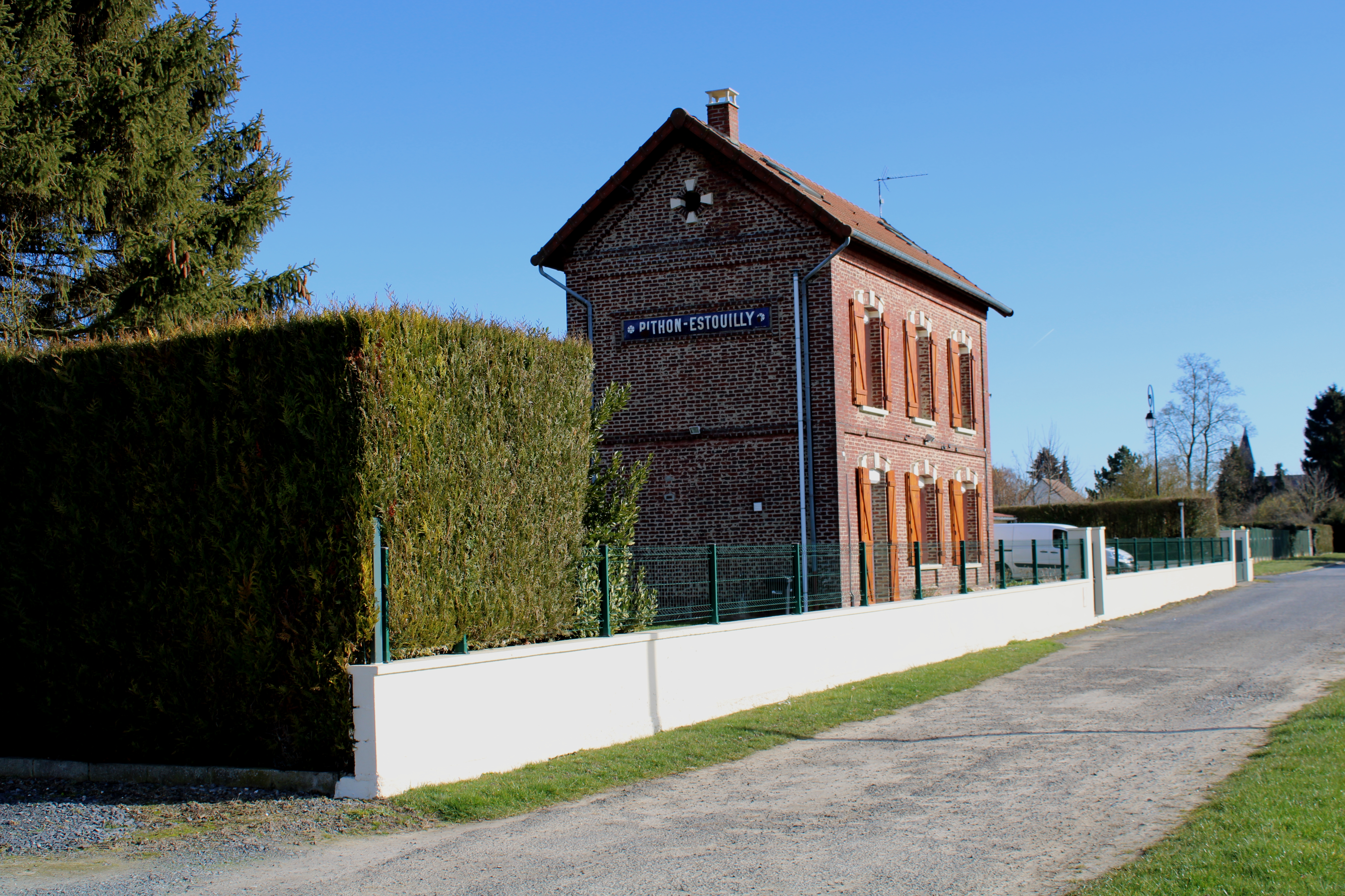 L'ancienne gare